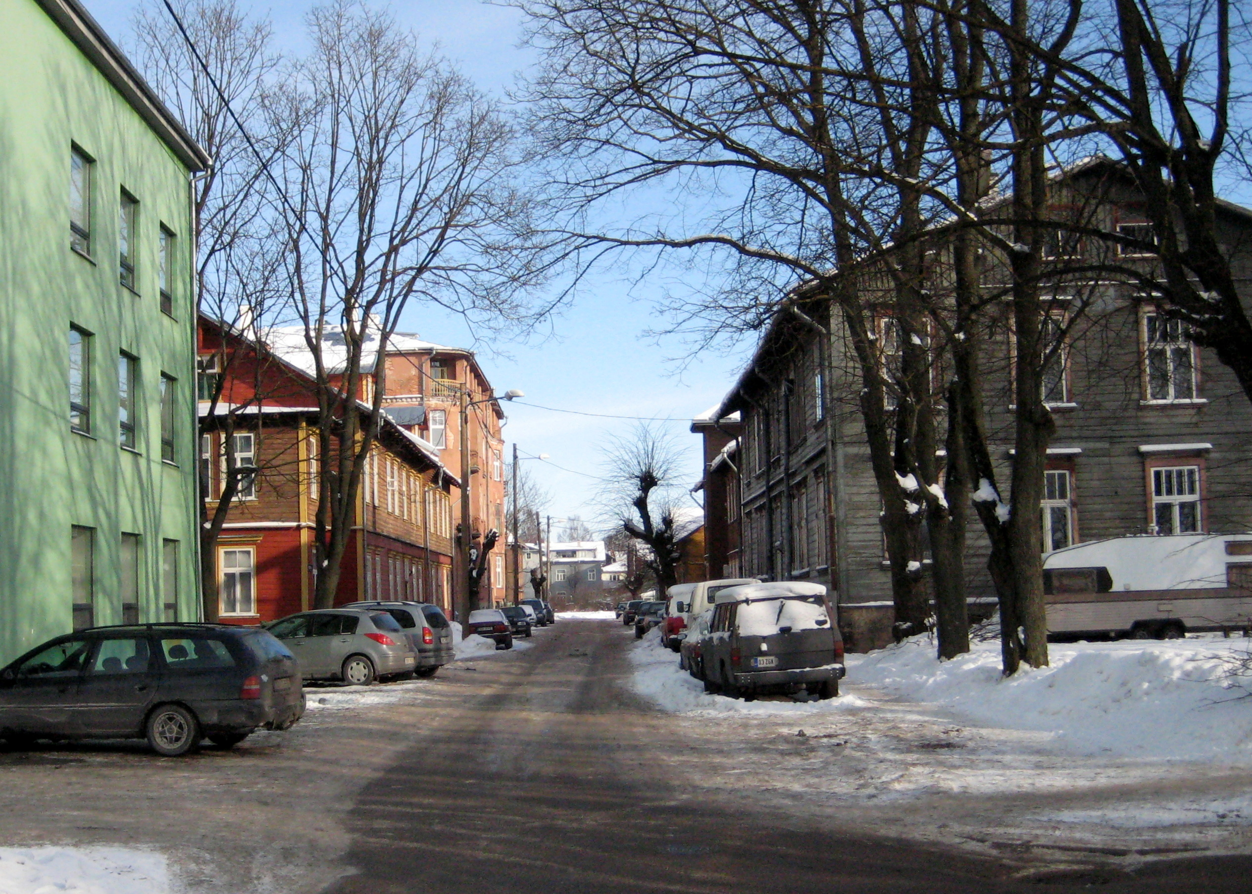 Vabriku tänav Vaksali tänava poolt, Tartu